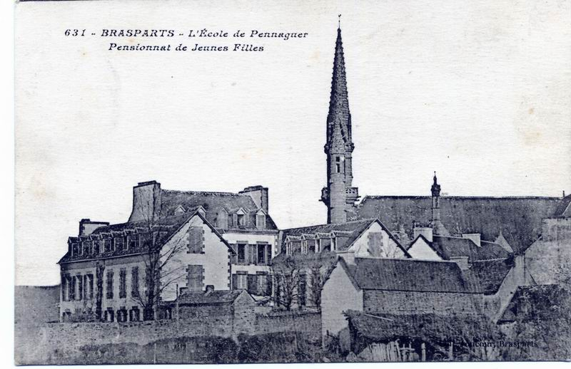 Brasparts : l'école de Pennaguer, pensionnat pour jeunes filles, en 1901